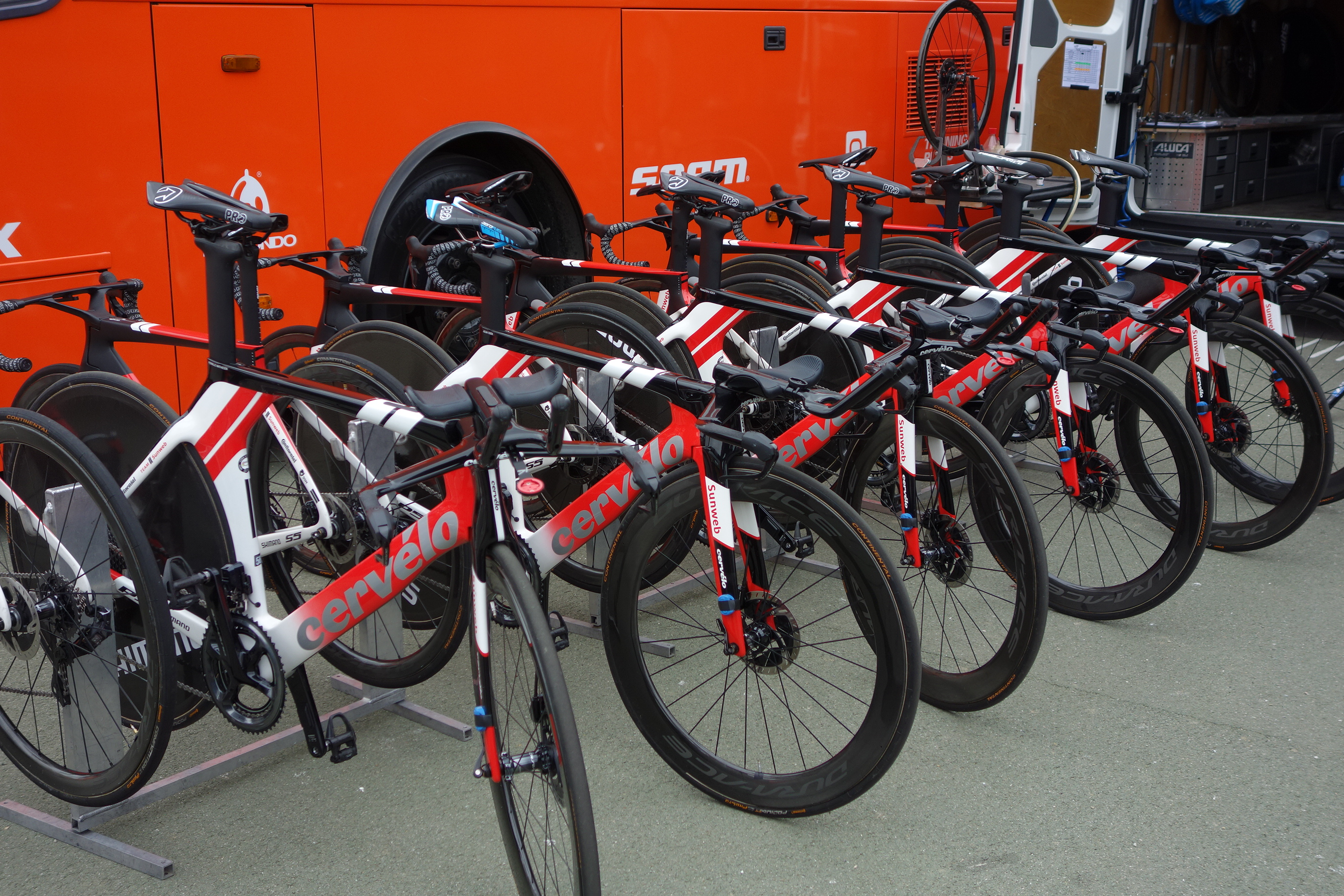 Fietsen van Sunweb bij de proloog op het Tom Dumoulin Bike Park in Sittard in de Boels Ladies Tour 2019